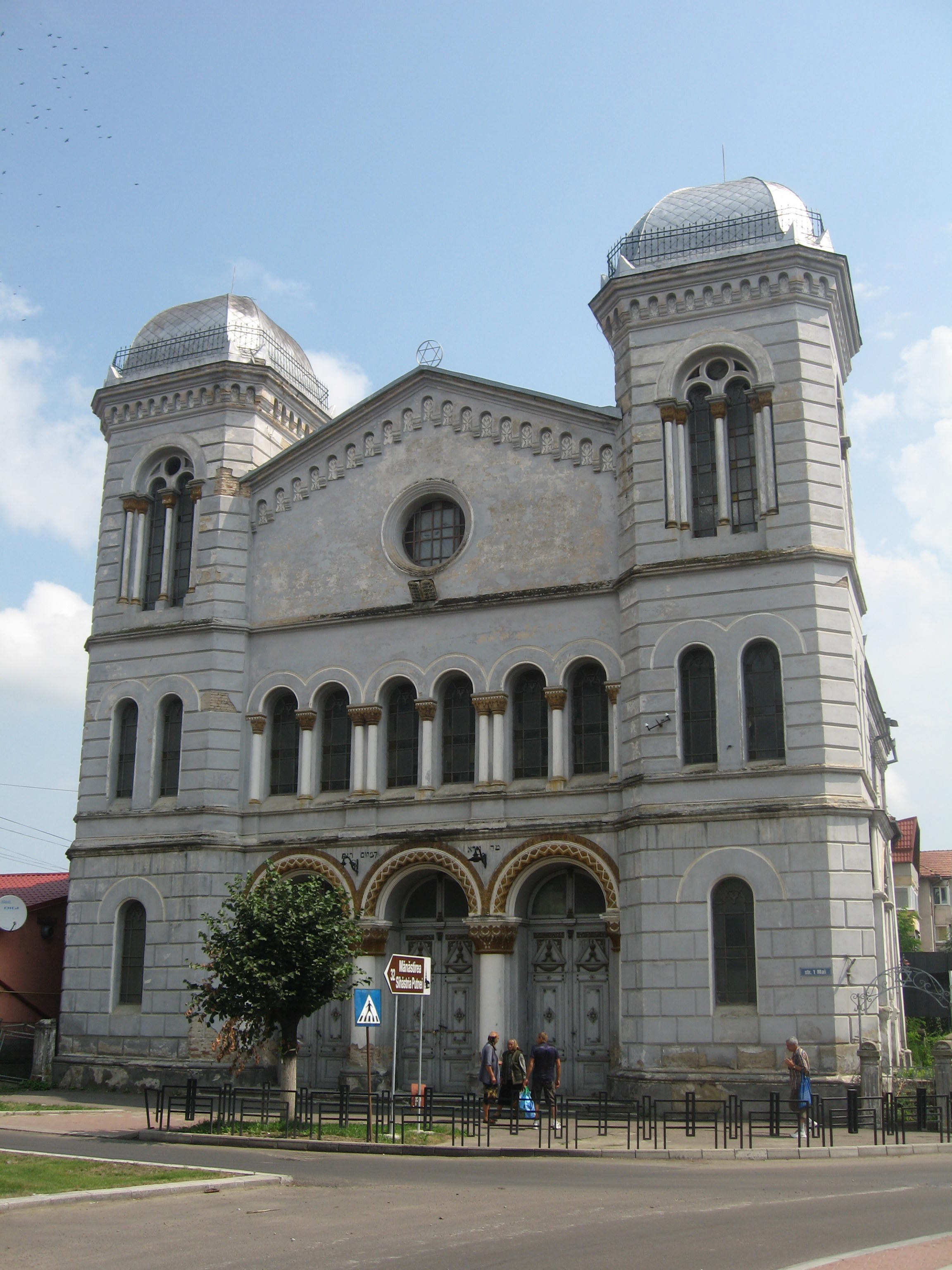 Templul Mare Evreiesc din Rădăuți